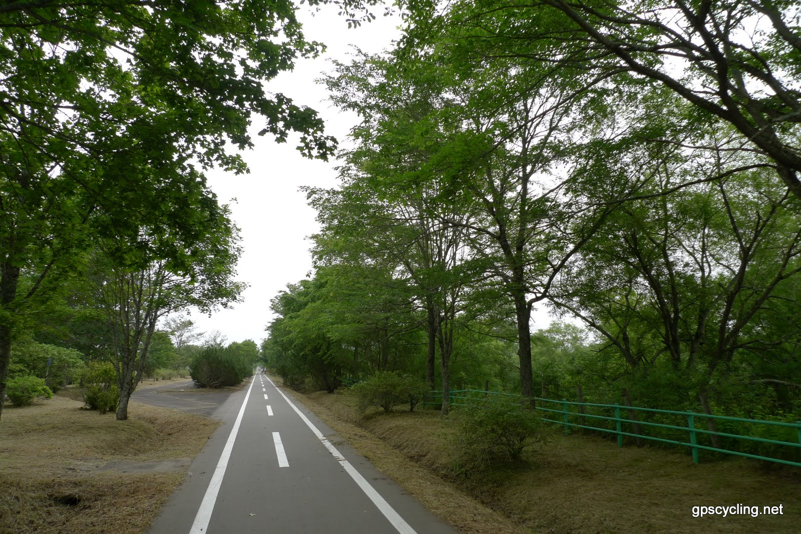 北海道道835号釧路阿寒自転車道線。panoramioより転載。